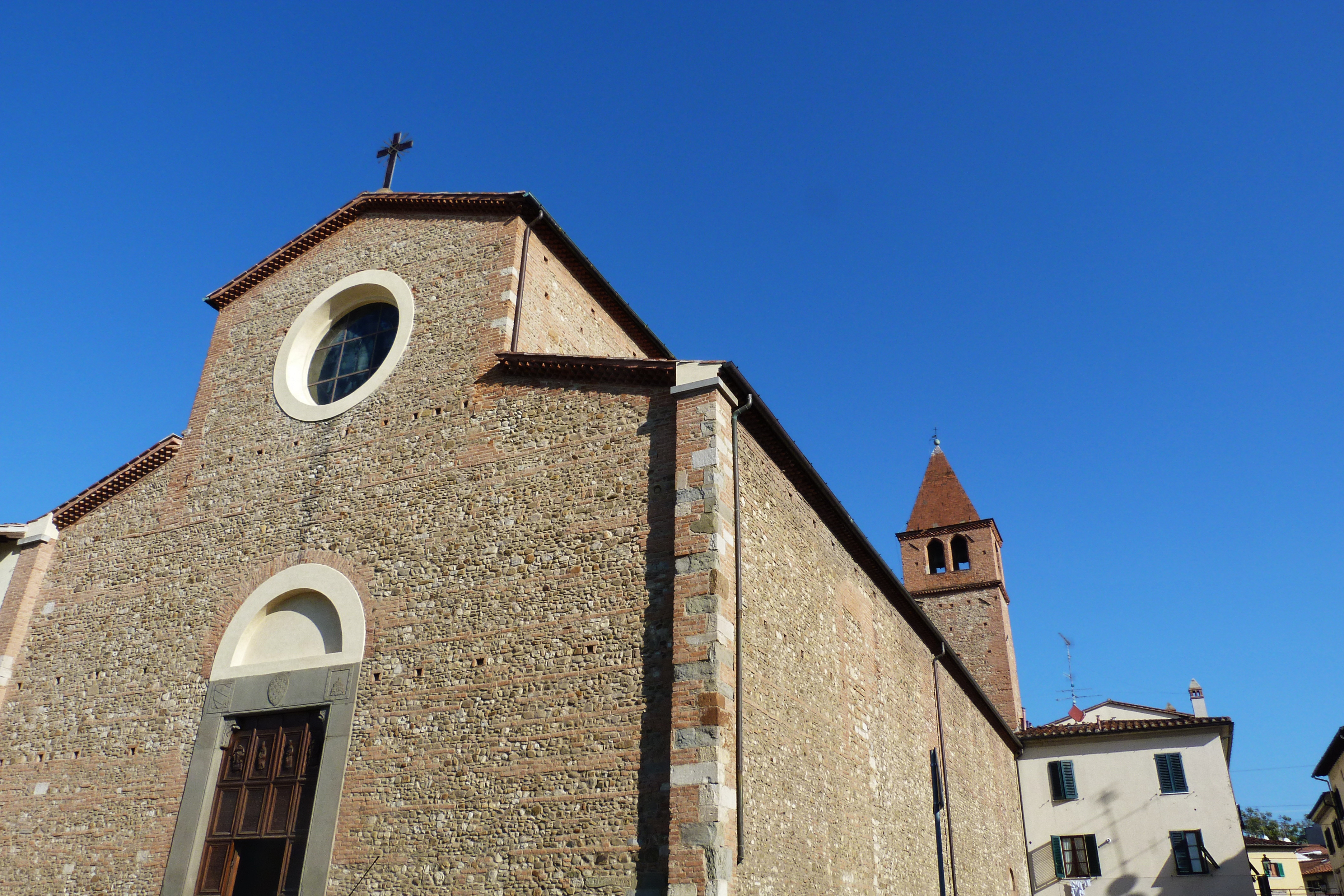 Chiesa di S. Agotino, piazza S. Agostino, Prato, Toscana, Italia This is a photo of a monument which is part of cultural heritage of Italy.